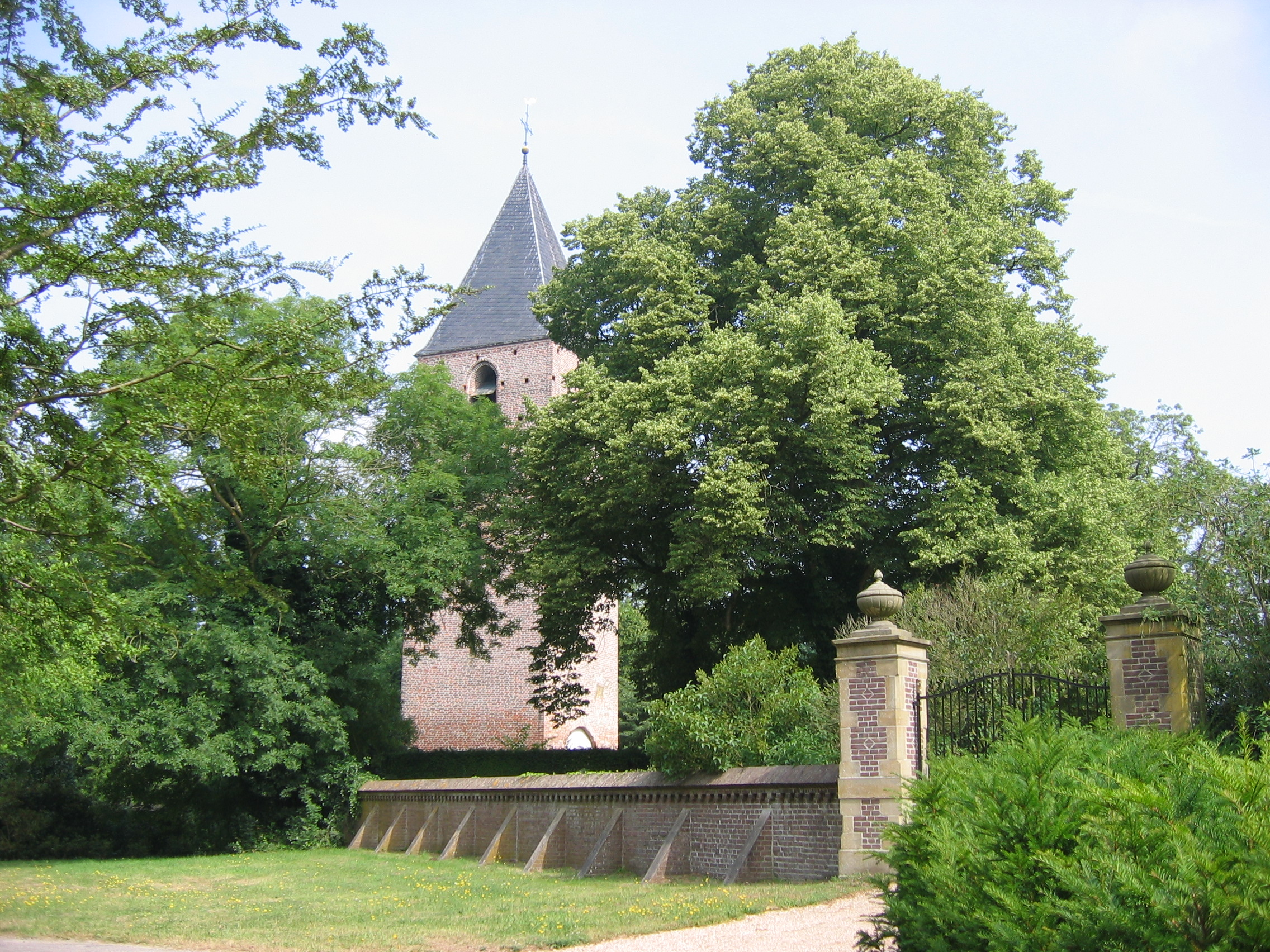 Oud-Leusden Historisch-geografische excursie 'Heuvelrug en Veluwe' 7 juli 2007 Erfgoedstudies VU Amsterdam Historische Geografie Oud-Leusden, Vlooswijkseweg 2 Rijksmonument 25790: Toren van de in 1828 gesloopte kerk, sober bakstenen bouwwerk. Klokkenstoel met klok van G. Koster, 1672, diam. 121,8 cm